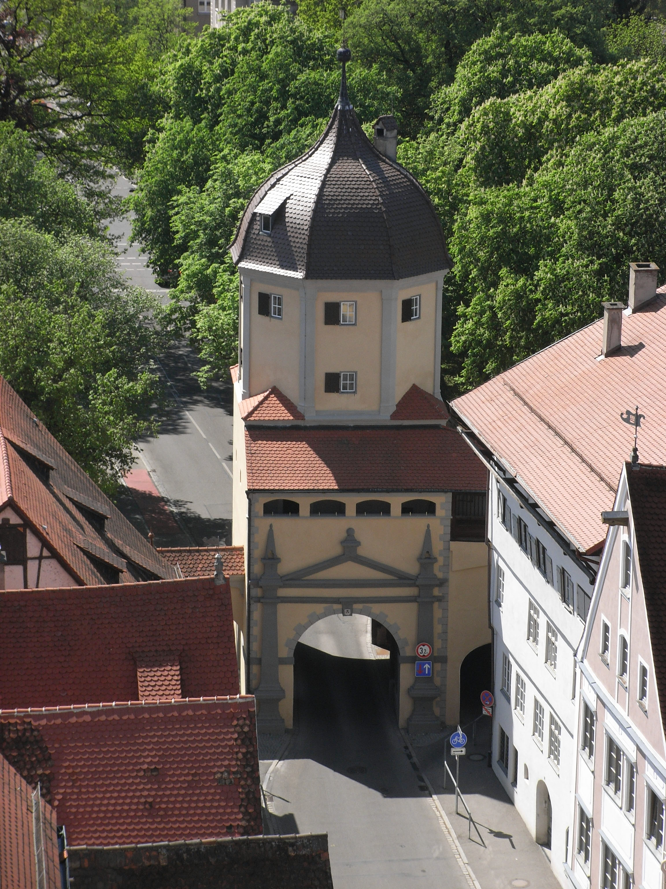 Das Westertor vom Kirchturm von St. Martin aus fotografiert.